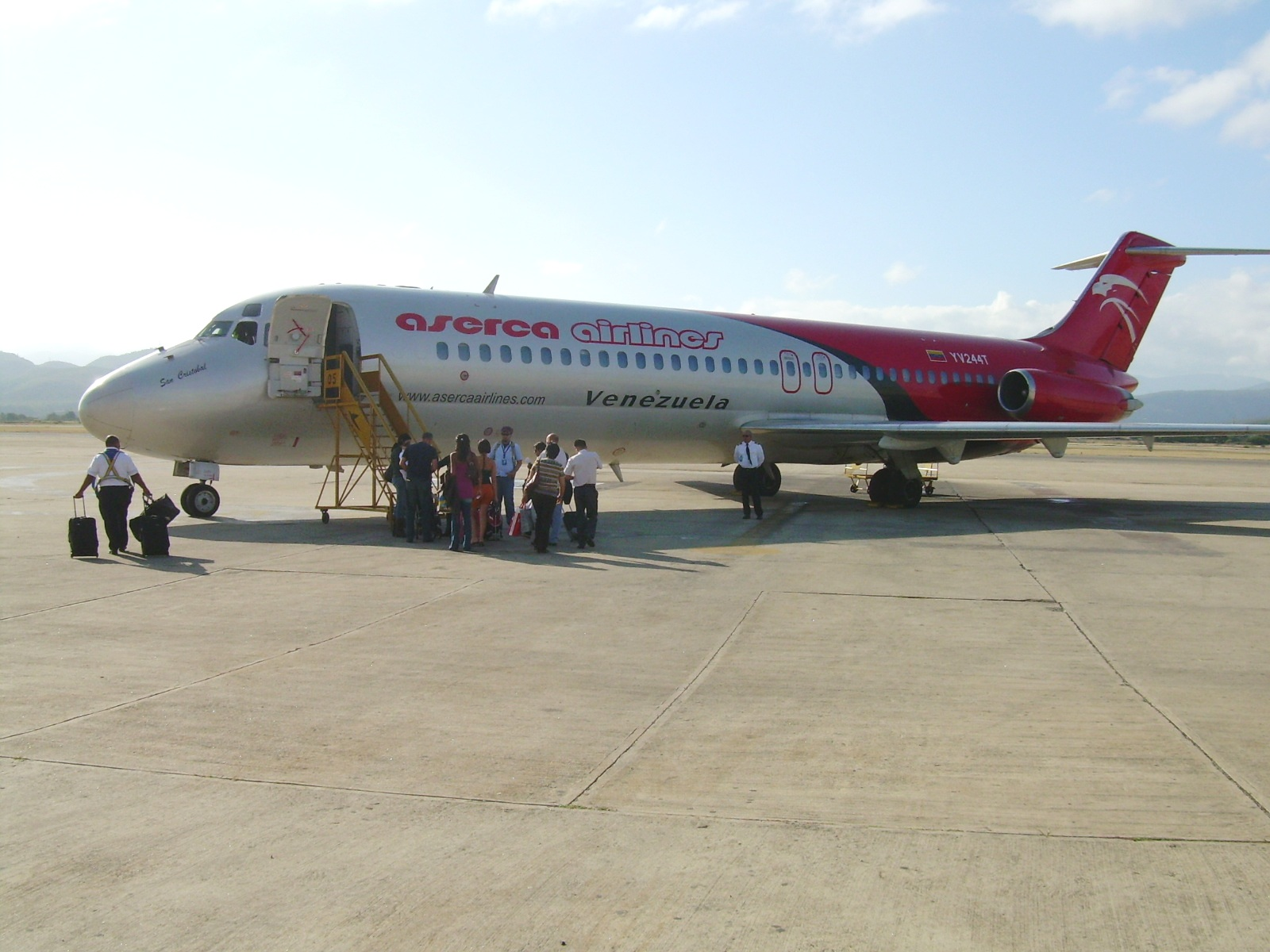 DC-9 at Jacinto Lara International Airport, Barquisimeto.